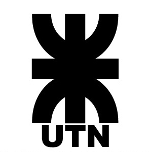 Universidad Tecnológica Nacional of Argentina logo.